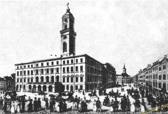 Ратуша перед 1848 р. З літографії К. Ауера.